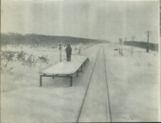 湧網線北見富丘駅